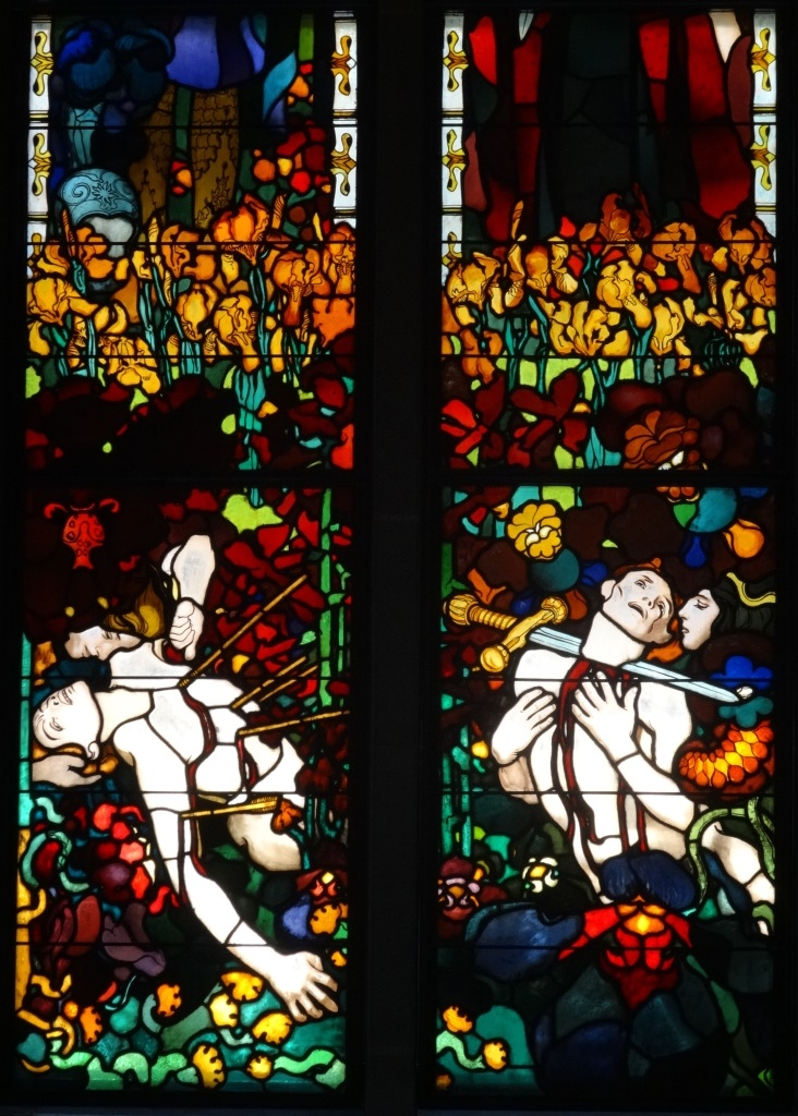 Cathédrale St-Nicolas de Fribourg (Suisse). Józef Mehoffer : Vitrail des martyrs (détail).